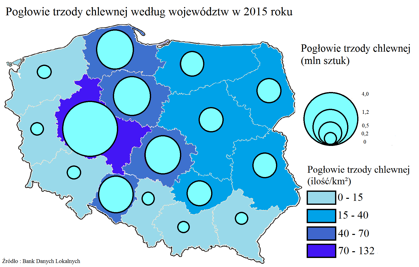 Mapa świń w Polsce